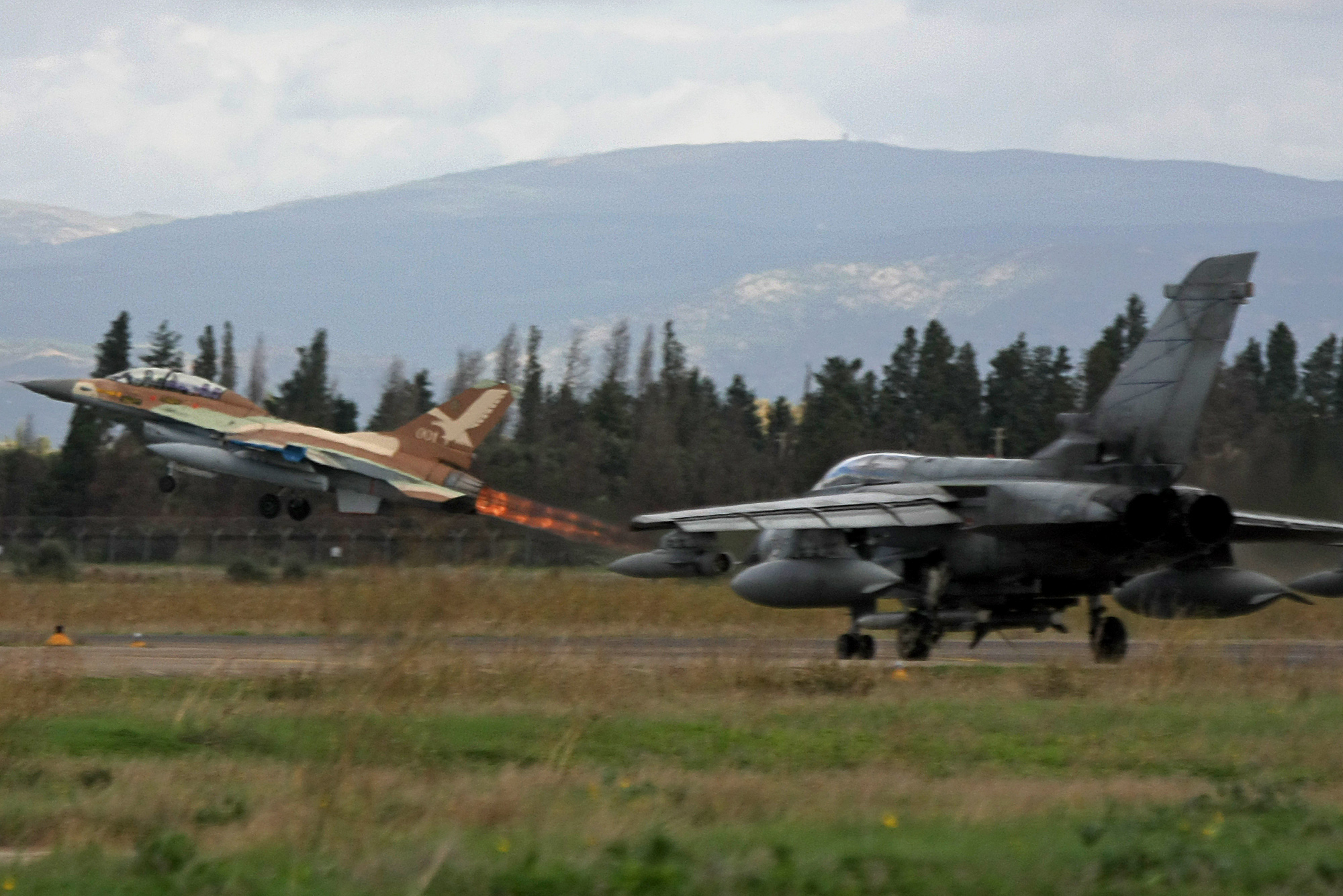 November 17, 2010. The Israel Air Force and the Italian Air Force conclude an extensive, two-week exercise in Sardinia. For more information, see: wp.me/ppbEs-13D חיל האוויר הישראלי וחיל האוויר האיטלקי מסכמים תרגיל בן שבועיים בסרדיניה, אשר באיטליה.